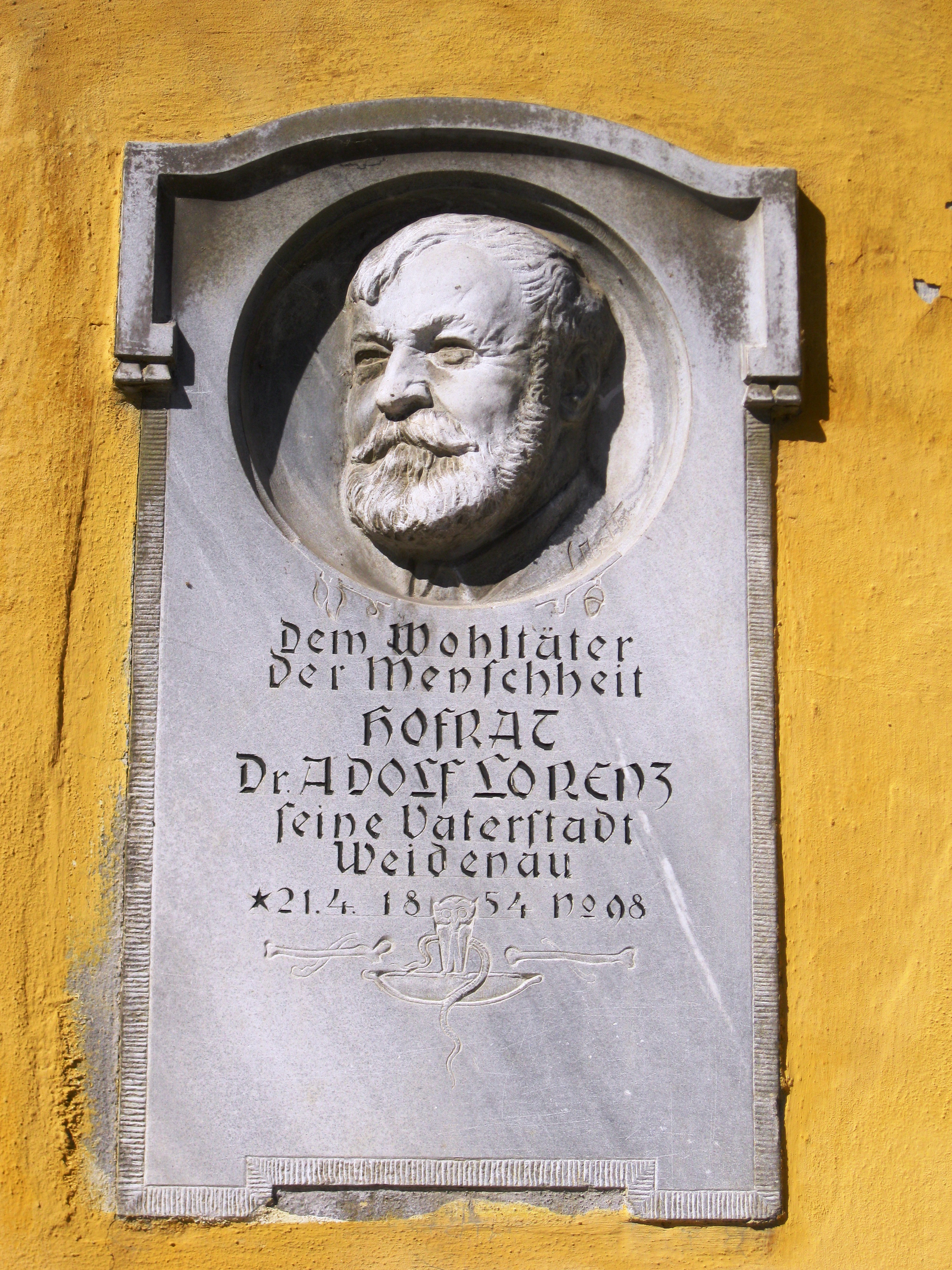 Městský dům s pamětní deskou Dr. Adolfa Lorenze (Vidnava), Mírové nám. 66, Vidnava